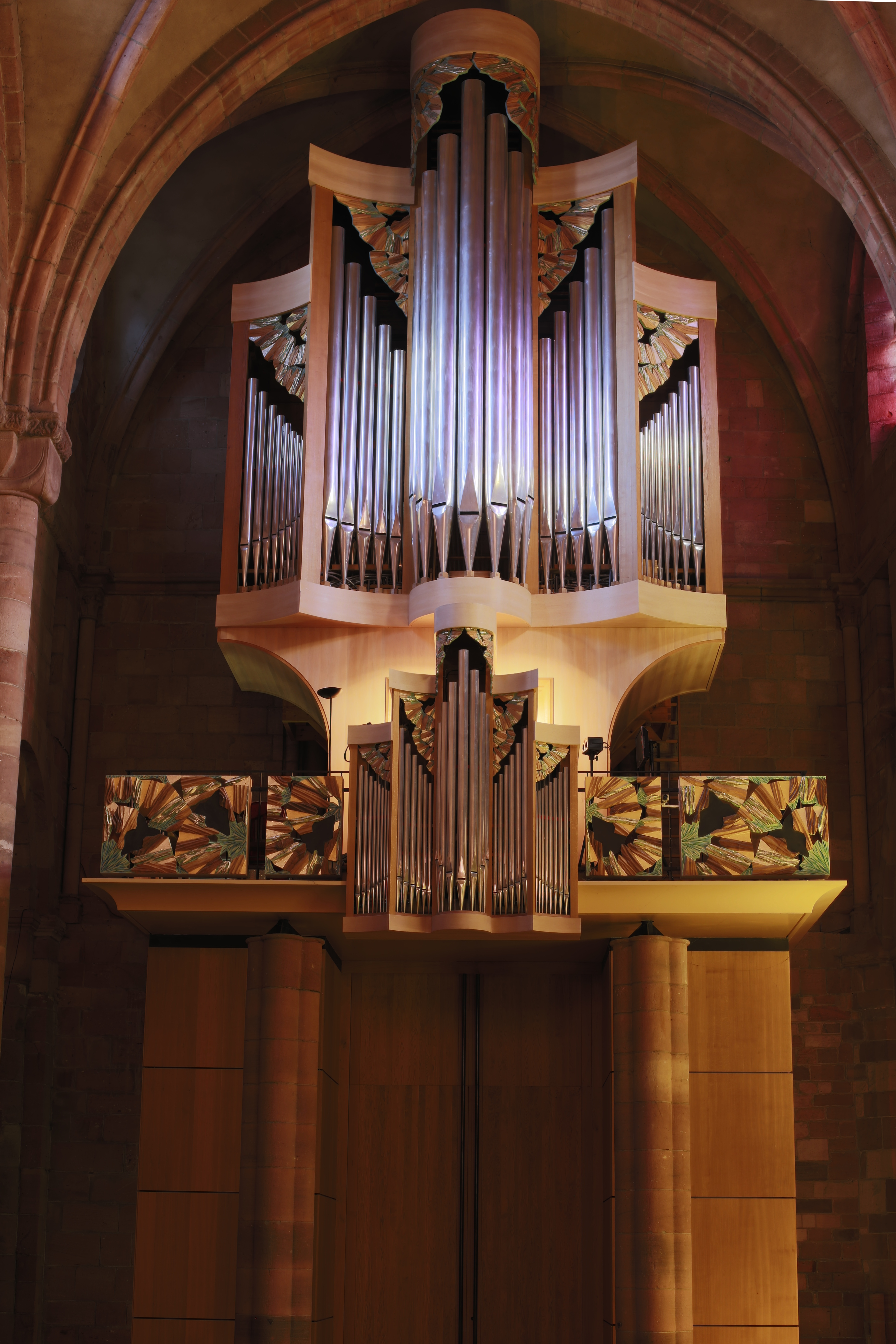 Orgue de la cathédrale Saint-Dié de Saint-Dié-des-Vosges.